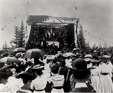 5e Convention nationale acadienne de Caraquet, au Nouveau-Brunswick, en 1905.